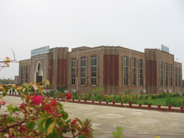 IBA Sukkur